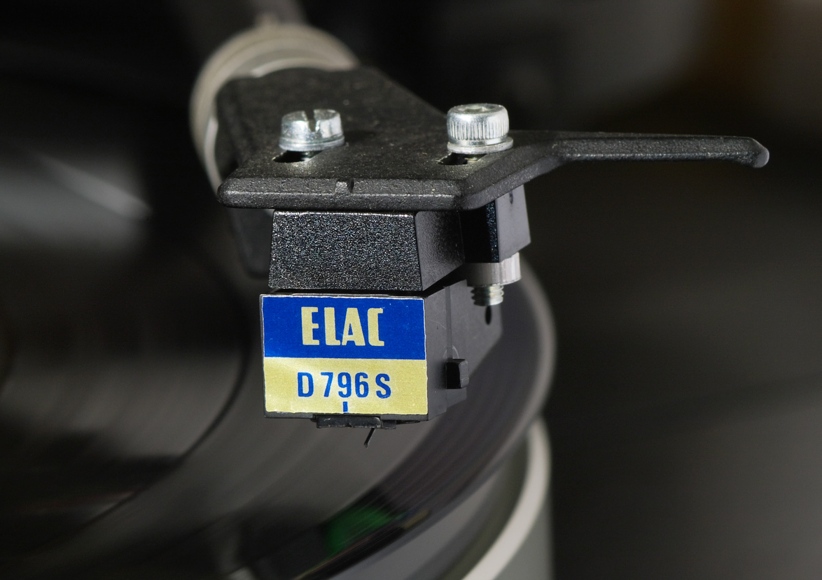 ELAC-Tonabnehmersystem D796S